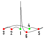 Schlagfigur 6-8